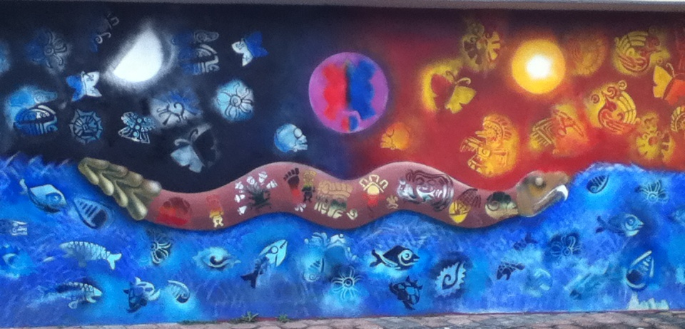 Sistema de Bachillerato del Gobierno del Distrito Federal. Instituto de Educación Media Superior (IEMS)